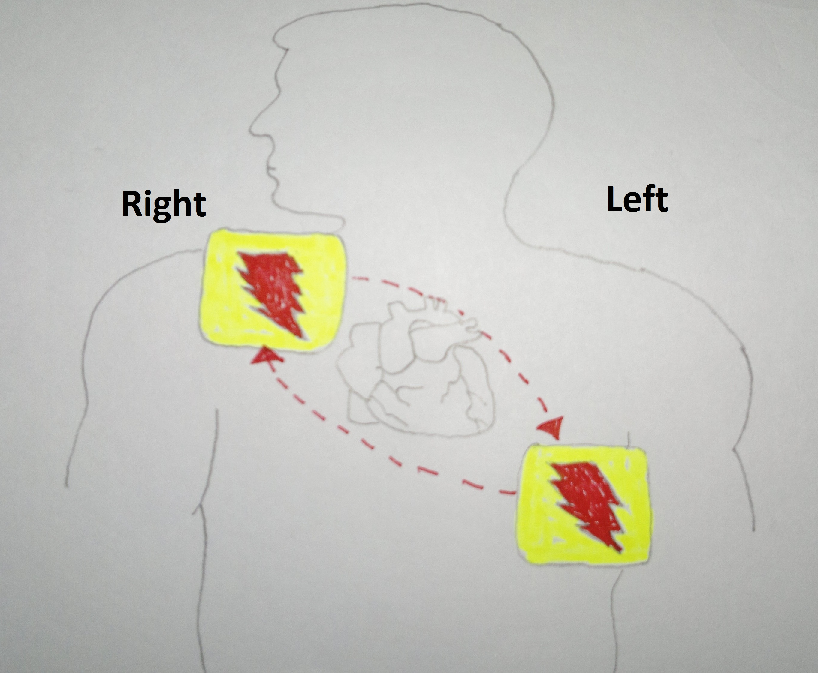 Penempatan elektrod defibrilator